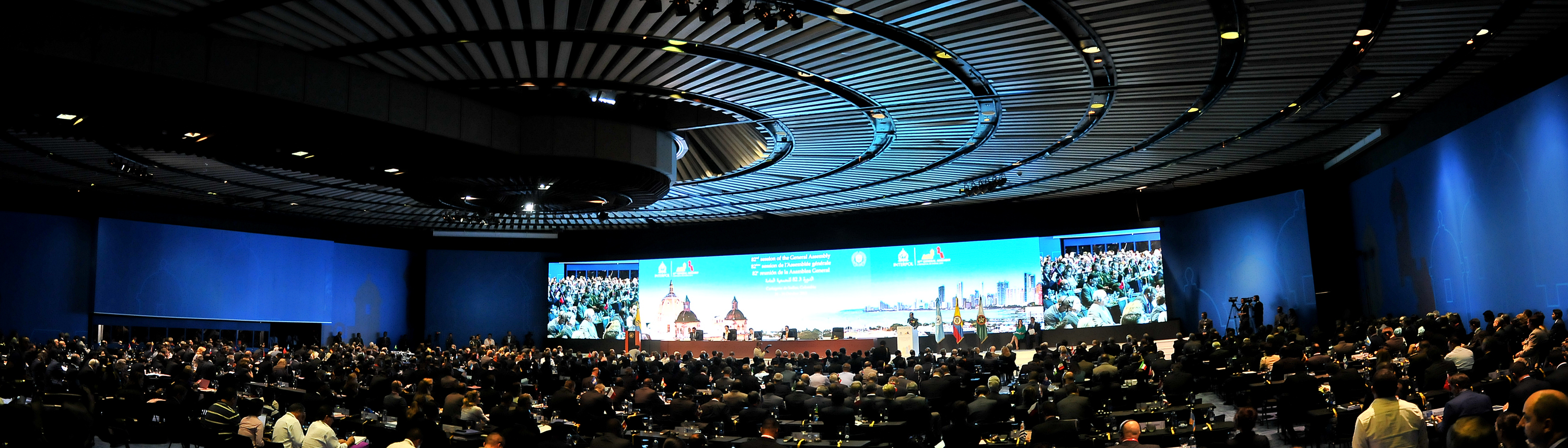 Asamblea 82 de Interpol, Cartagena, Colombia